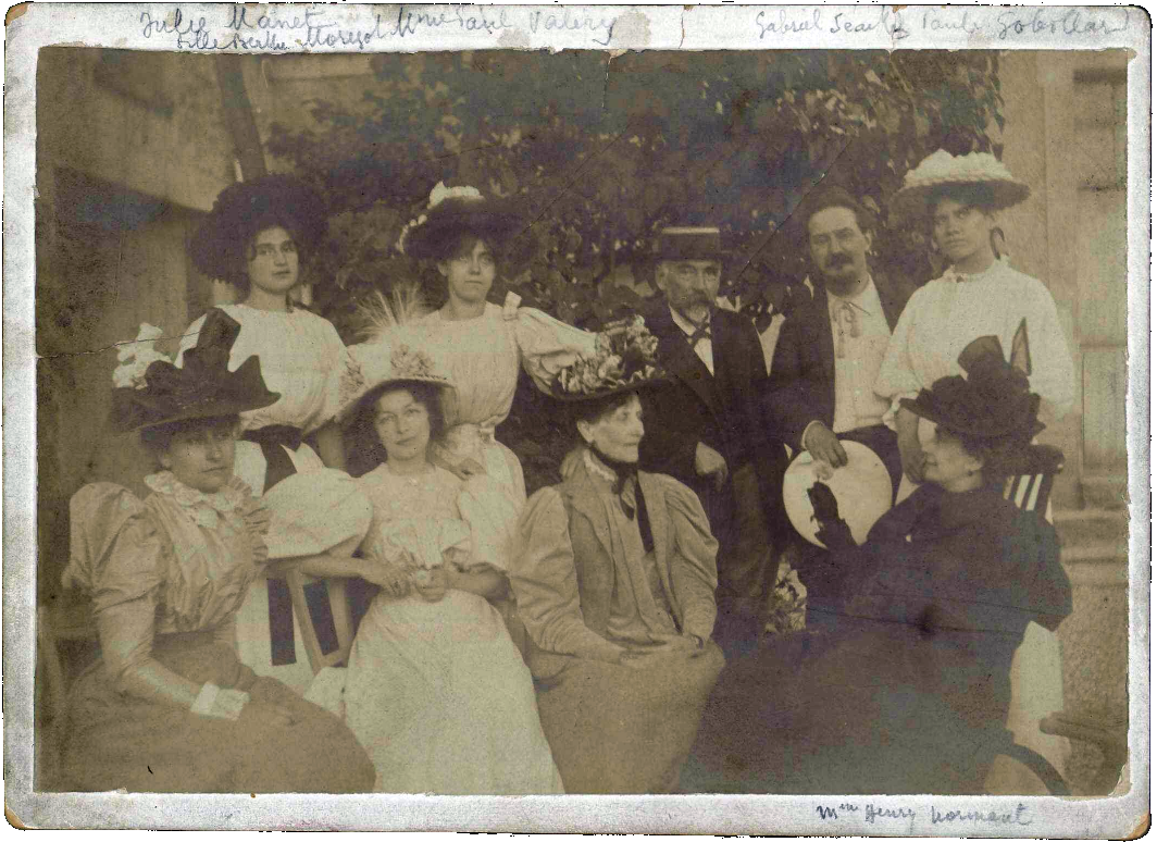 Stéphane Mallarmé, Marie Mallarmé, Geneviève Mallarmé, Jeannie Gobillard, Paule Gobillard, etc. Photographie prise à Valvins. MNR Ms 1851.